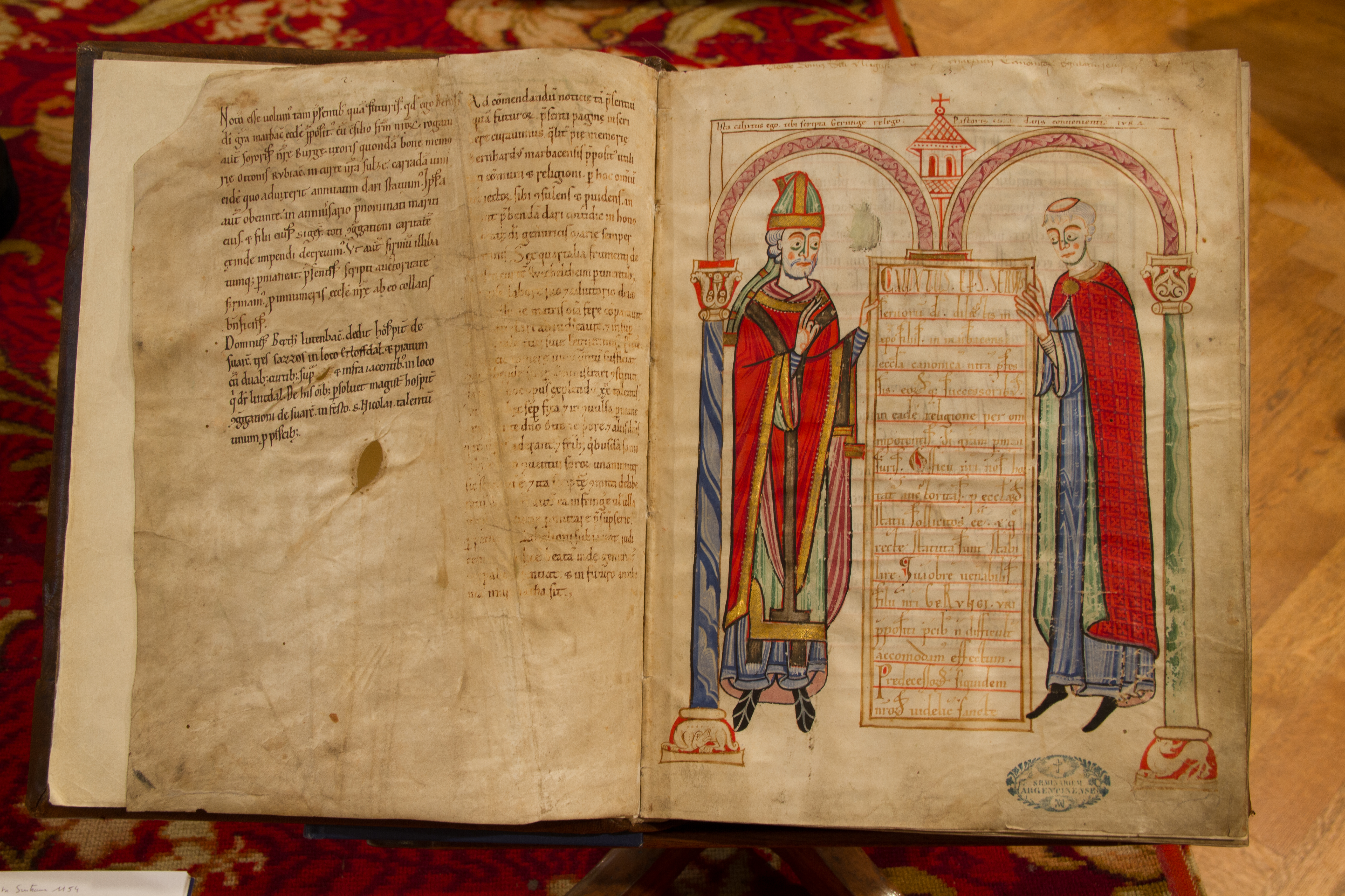 Codex Guta-Sintram, 1154